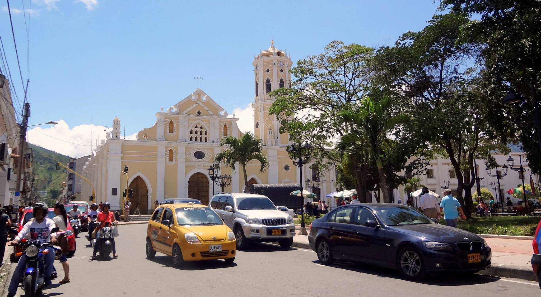 Imagen de la Catedral de Santa Ana en Ocaña Norte de Santander el día 26 de Octubre de 2015, aniversario numero 53 de la Diócesis de Ocaña y de su declaración como Catedral